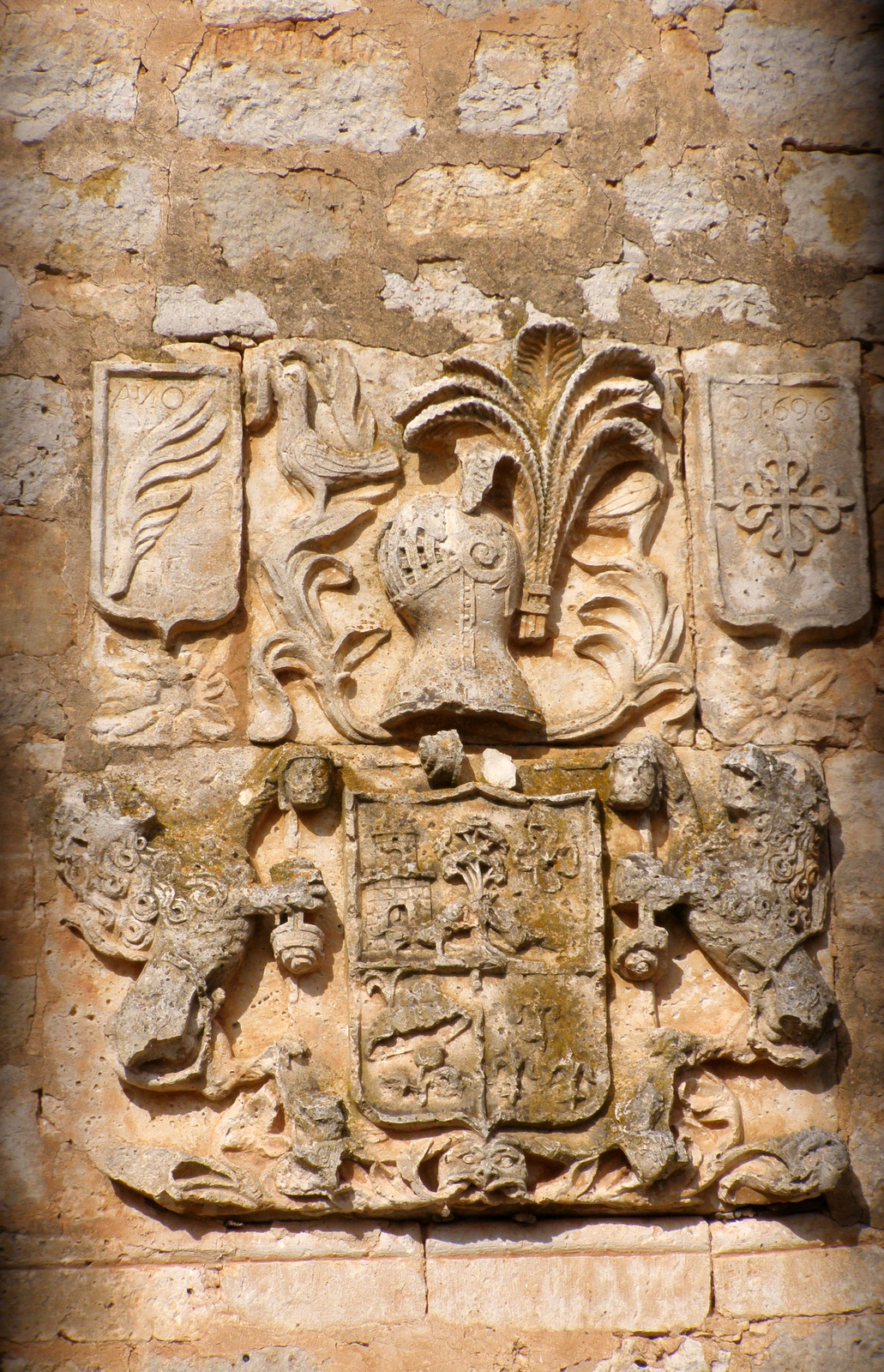 Escudo nobiliario en Arenillas de Villadiego, fechado en 1696.